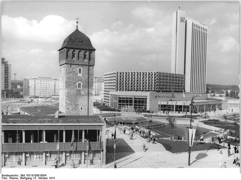 Chemnitz, Stadthalle, "Roter Turm" ADN-ZB Thieme 6.10.74-str-Karl-Marx-Stadt: 25.Jahrestag-Die Einweihung der neuen Stadthalle von Karl-Marx-Stadt schließt den Wiederaufbau des Zentrums dieser im Krieg stark zerstörten Arbeiterstadt ab. Bauarbeiter und Architekten übergaben termingerecht ein bedeutendes gesellschaftliches und kulturelles Bauwerk für die sächsische Industriemetropole. Der Rote Turm, historisches Wahrzeichen der Stadt, steht in interessantem Kontrast zu den neuen Gebäuden. (Achtung, gehört zu zweiteiliger Serie, siehe N 1006-3N)